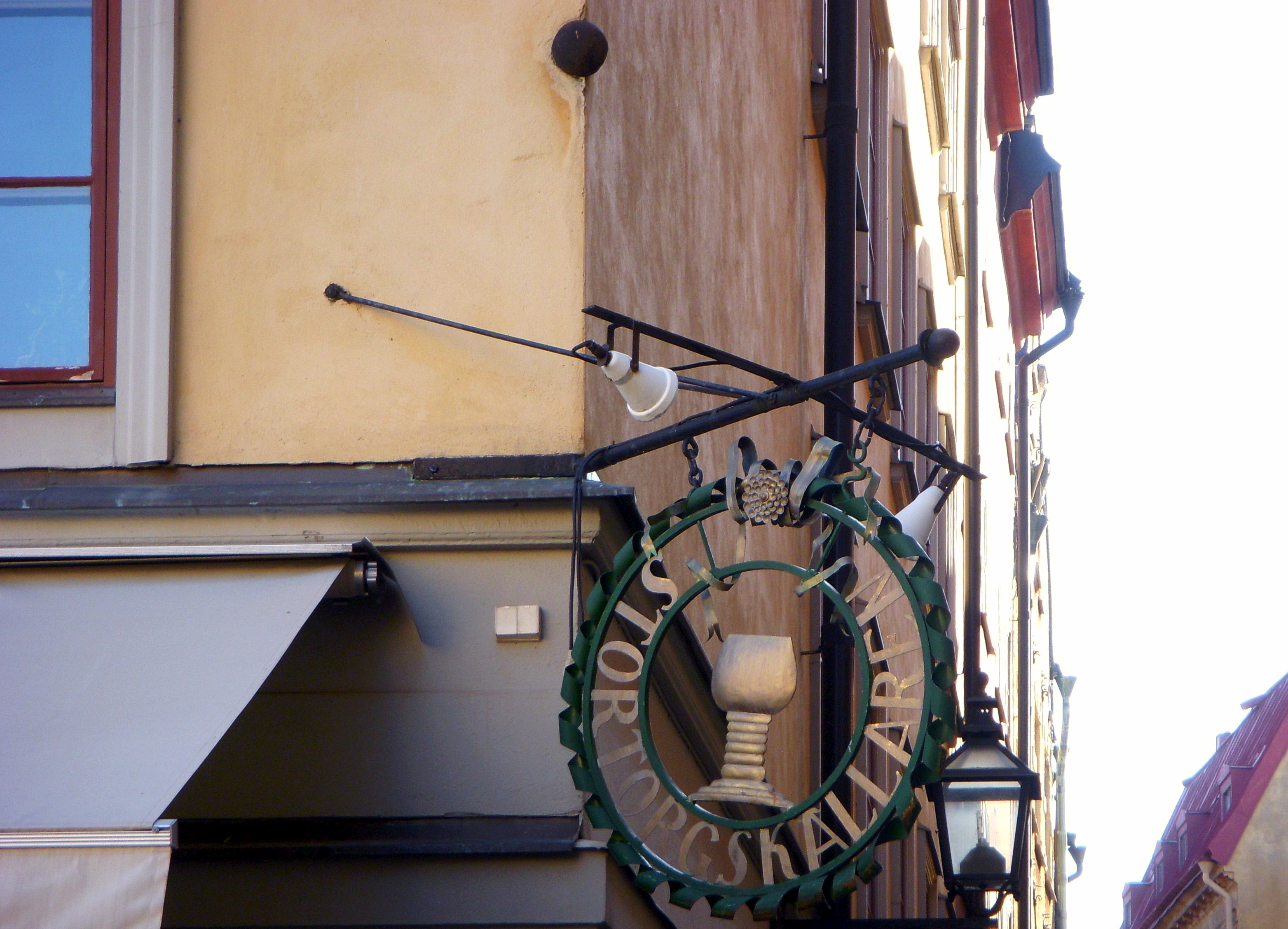 Stortorget Gamla Stan, kanonkulan i hörnet Skomakargatan